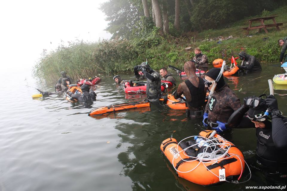 Łowiectwa podwodnego - konkurencji